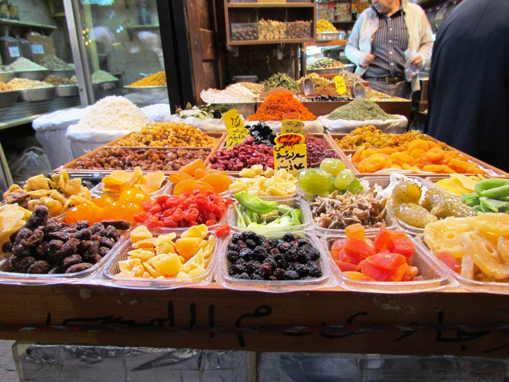 فواكه مجففة لذيذة